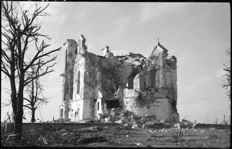 Sugriauta Kužių Švč. Mergelės Marijos Gimimo bažnyčia